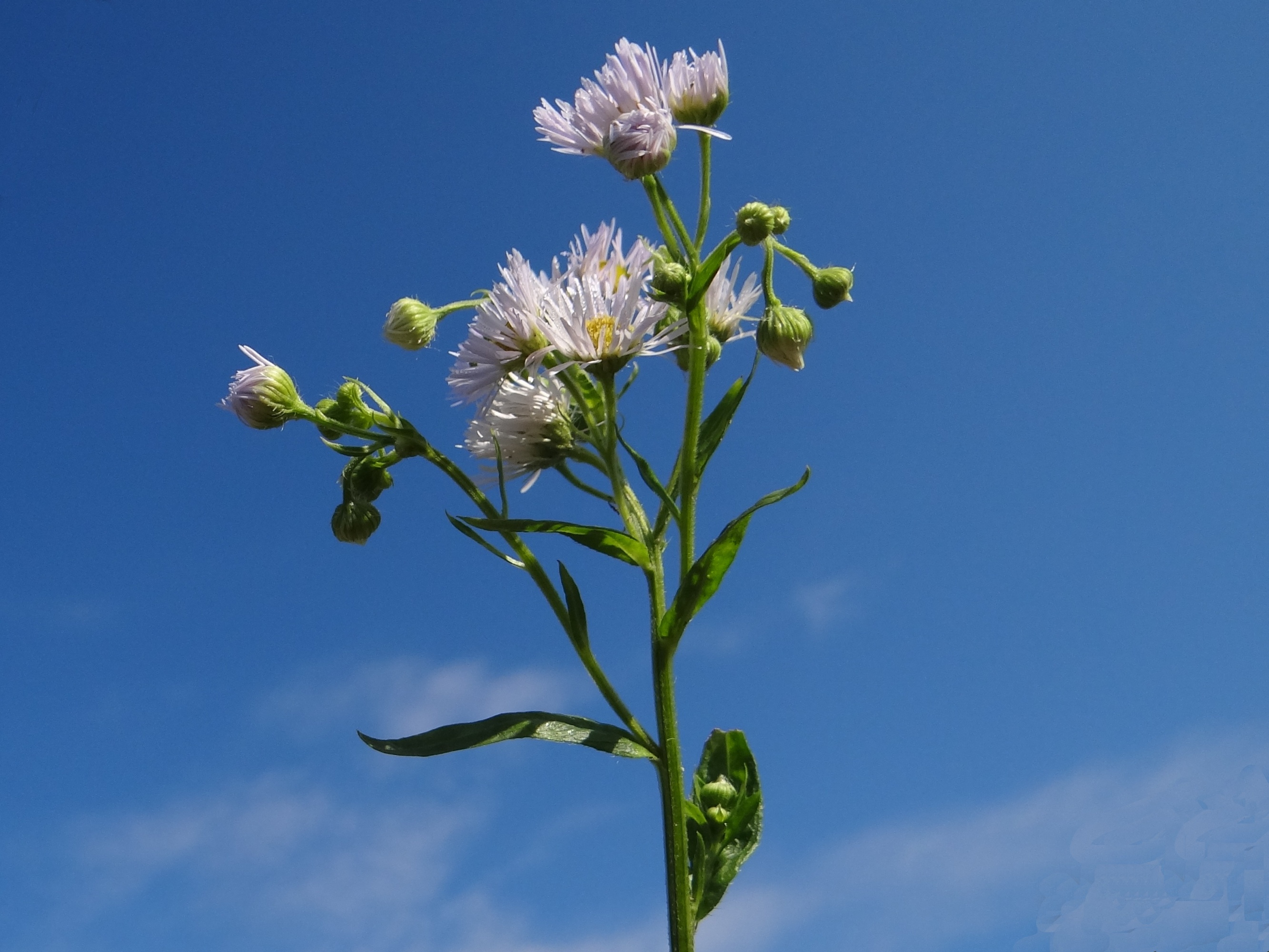 Erigeron annuus